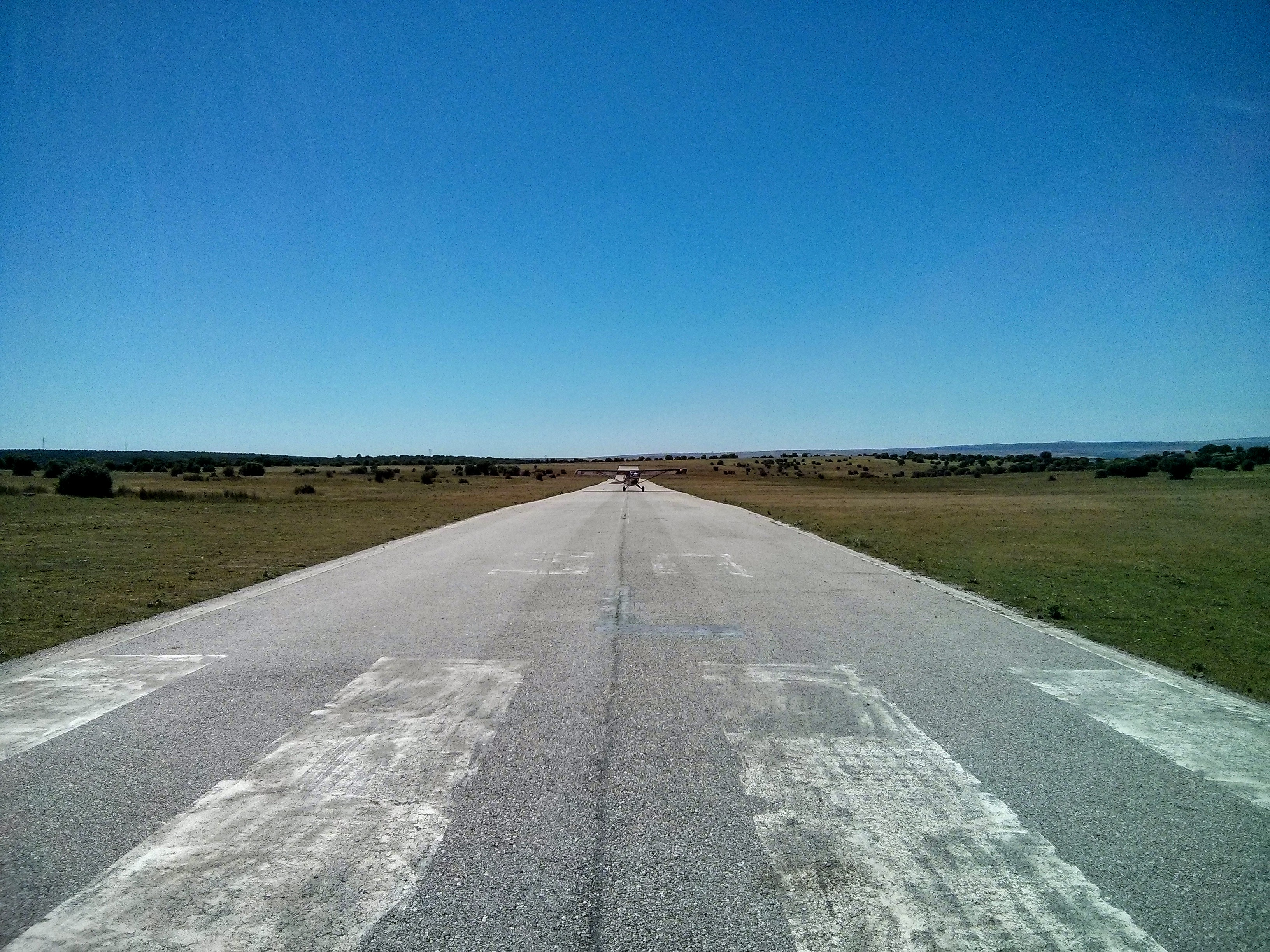 Pista 30 de asfalto del Aeródromo Santo Tomé del Puerto (LEPT)